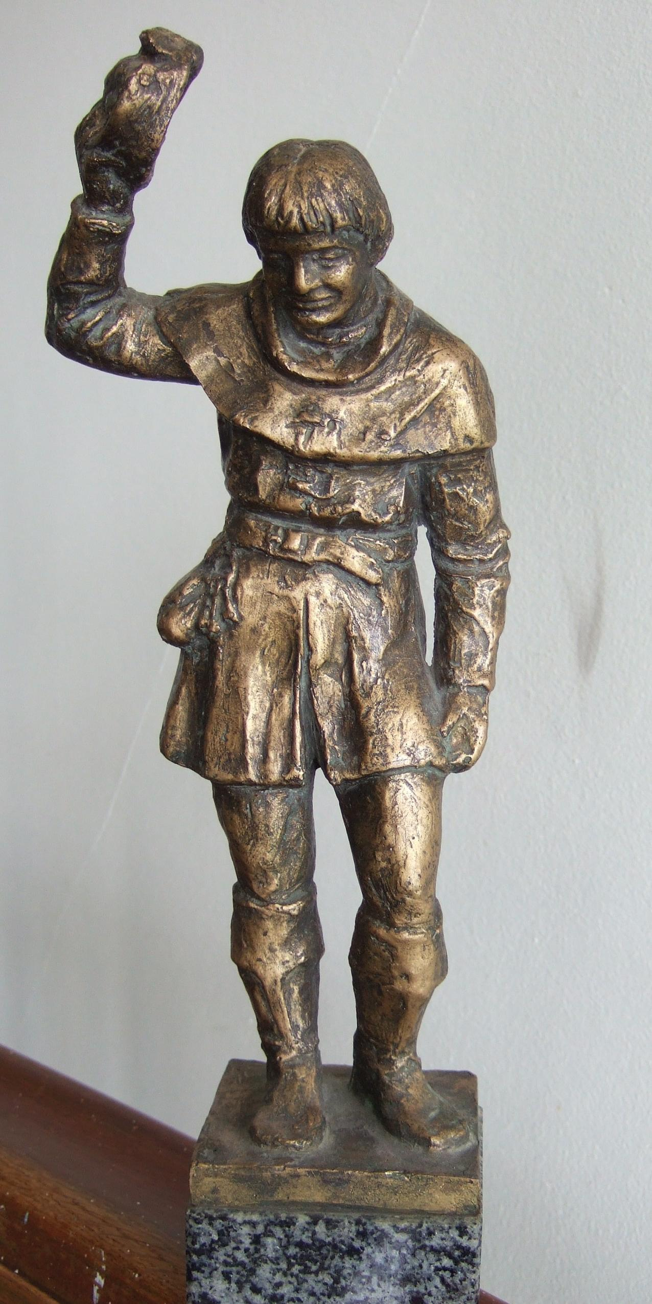 The Golden Beggar statuette